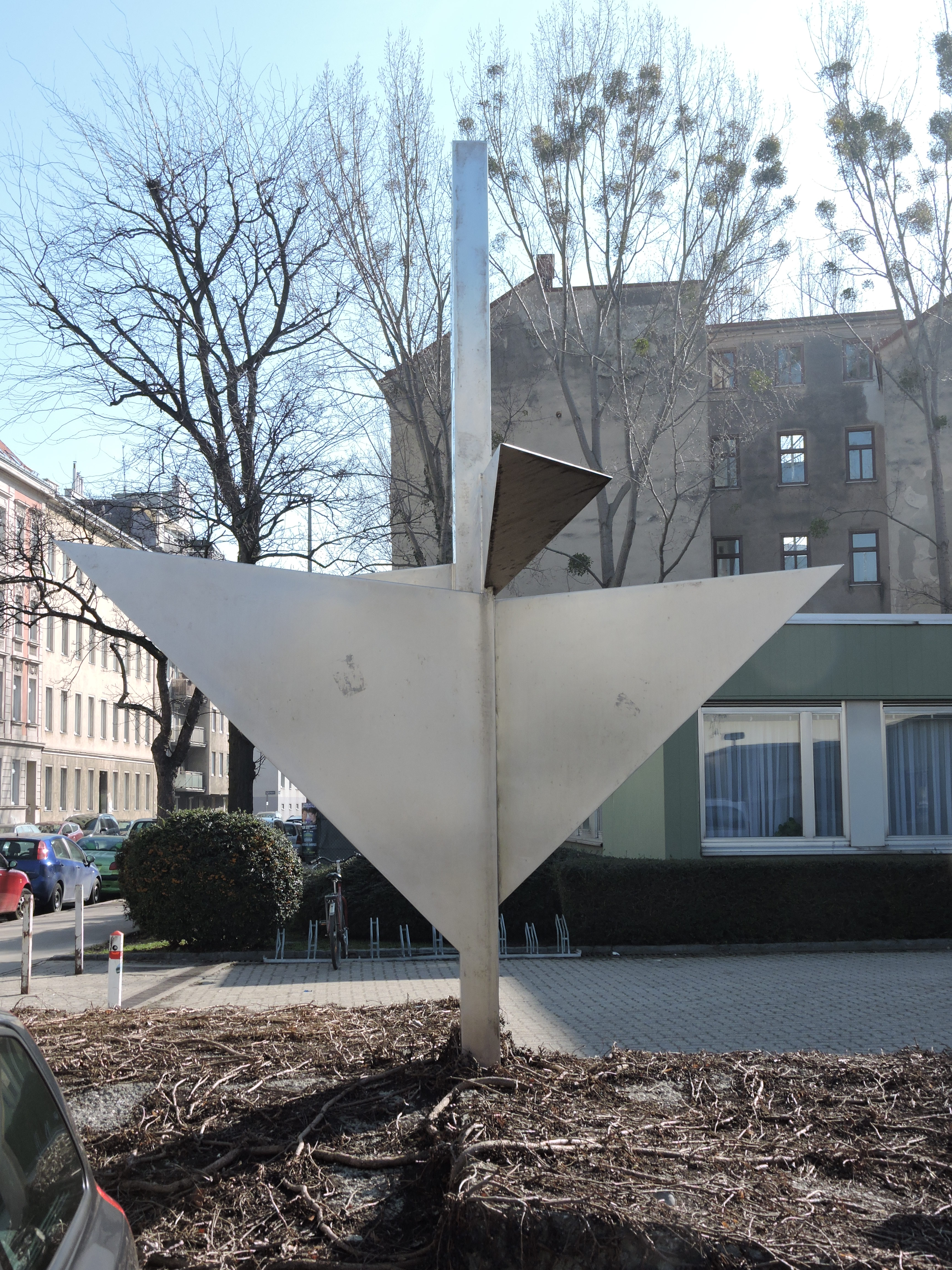 Disziplin